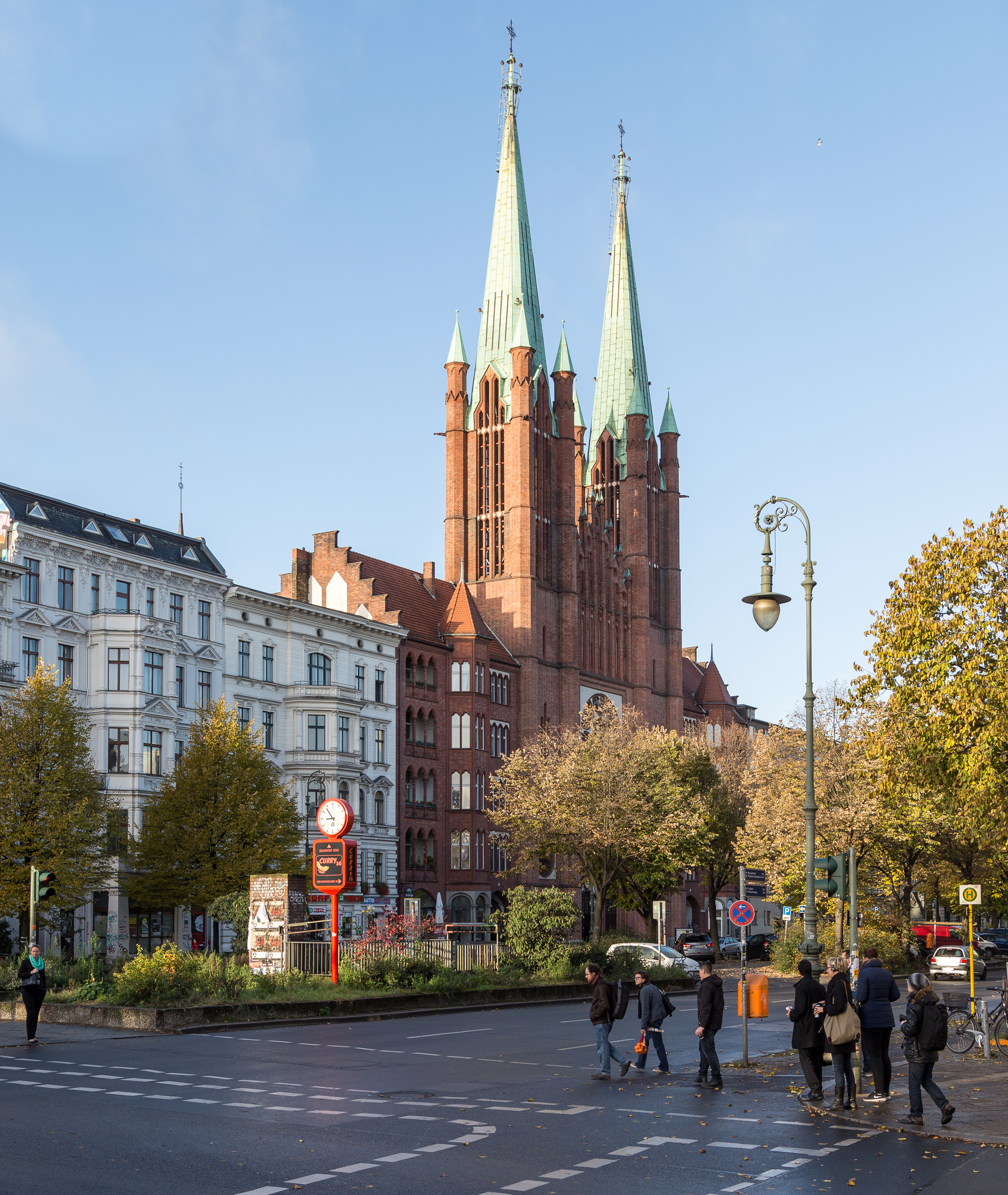 St. Bonifatius an der Yorckstraße in Berlin-Kreuzberg